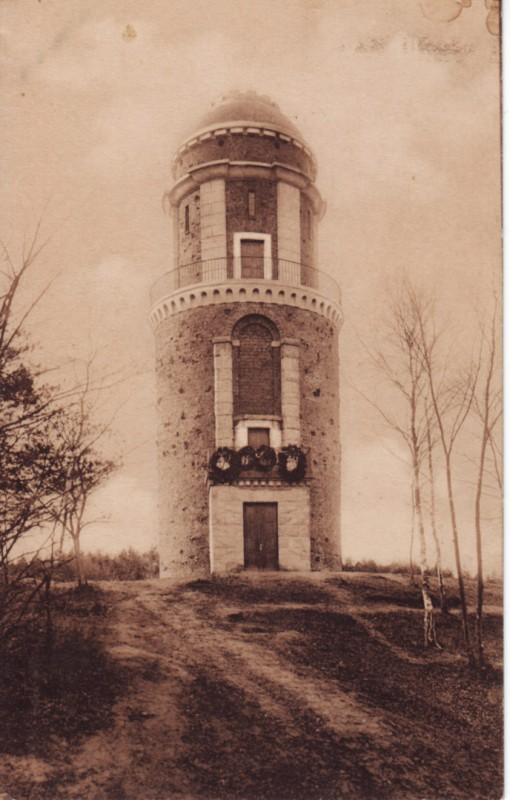 Offizielle Ansichtskarte des Bismarckturm-Vereins zu Harburg an der Elbe (Stadt- und Landkreis) e. V.